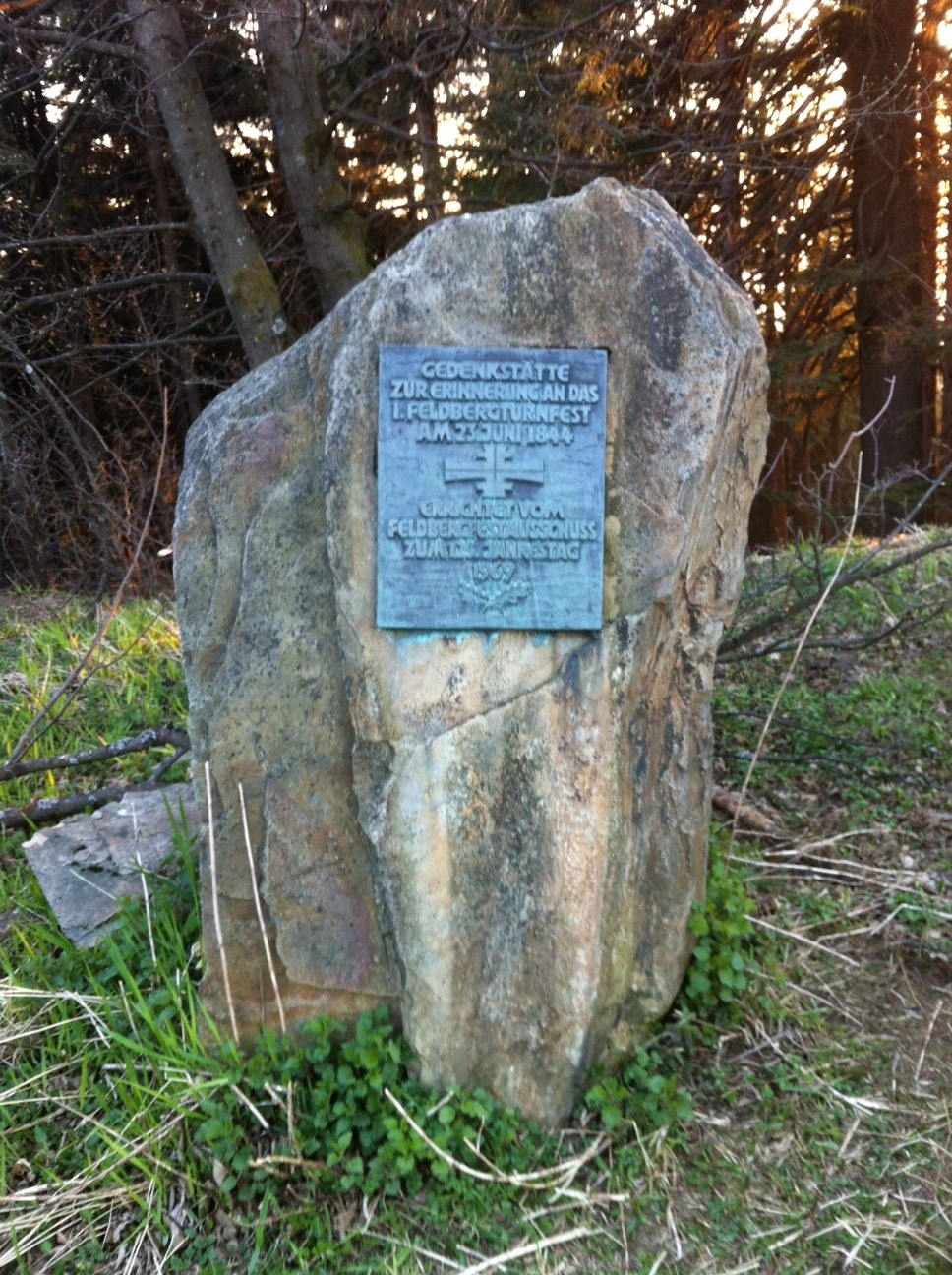 Gedenkstein Feldbergturnfest